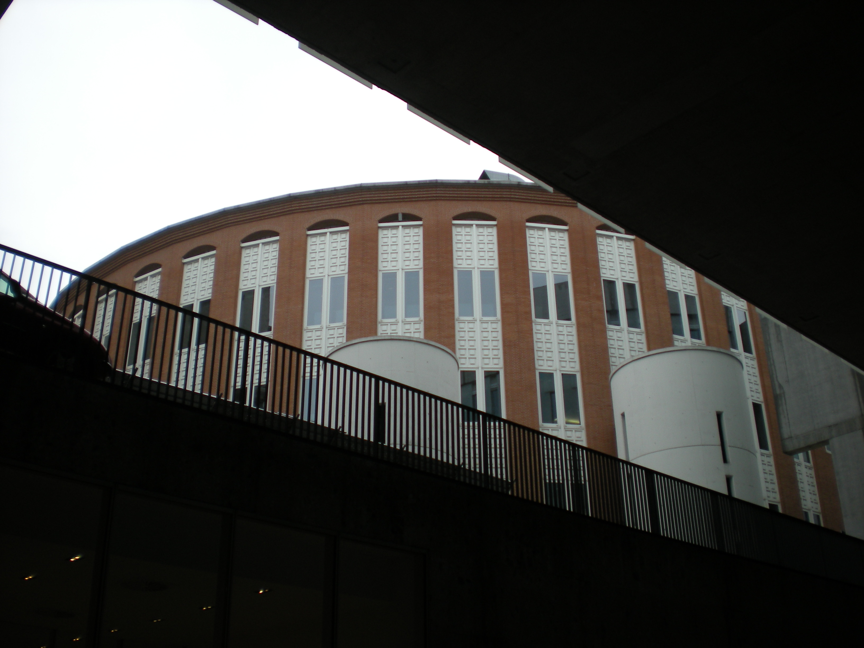 Una nuova costruzione della Università degli studi Luigi Bocconi - Milano